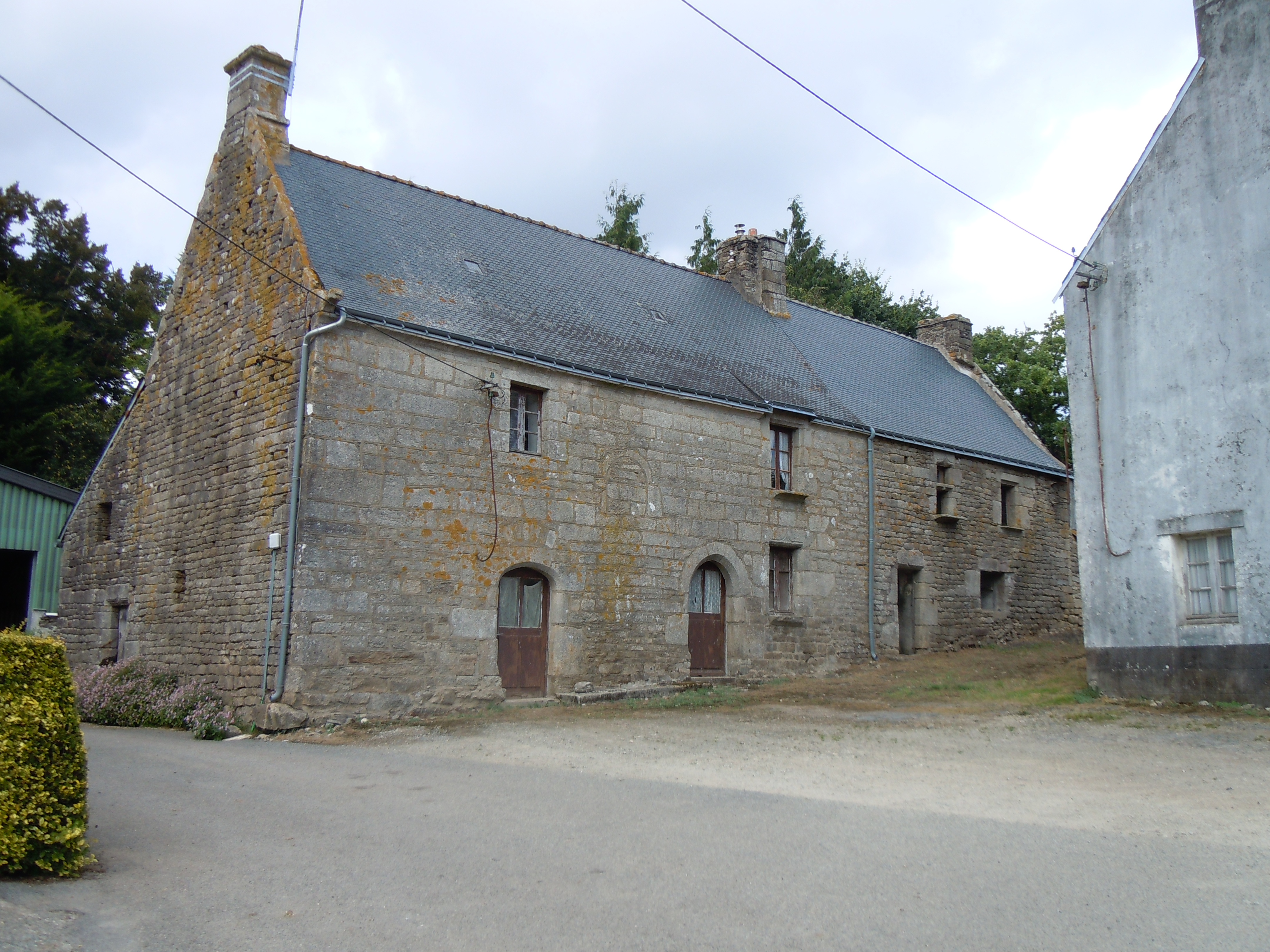 ferme et ancienne maison de prêtre ou ancien manoir situés au village de Saint Coal, commune de Guilligomarc'h, département du Finistère, France